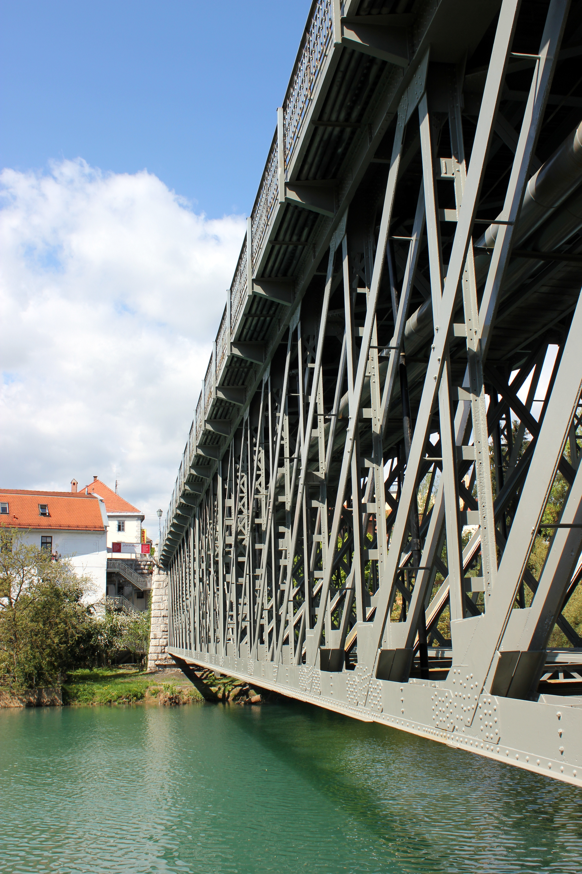 Brücke über die Krka in Novo mesto, Slowenien.